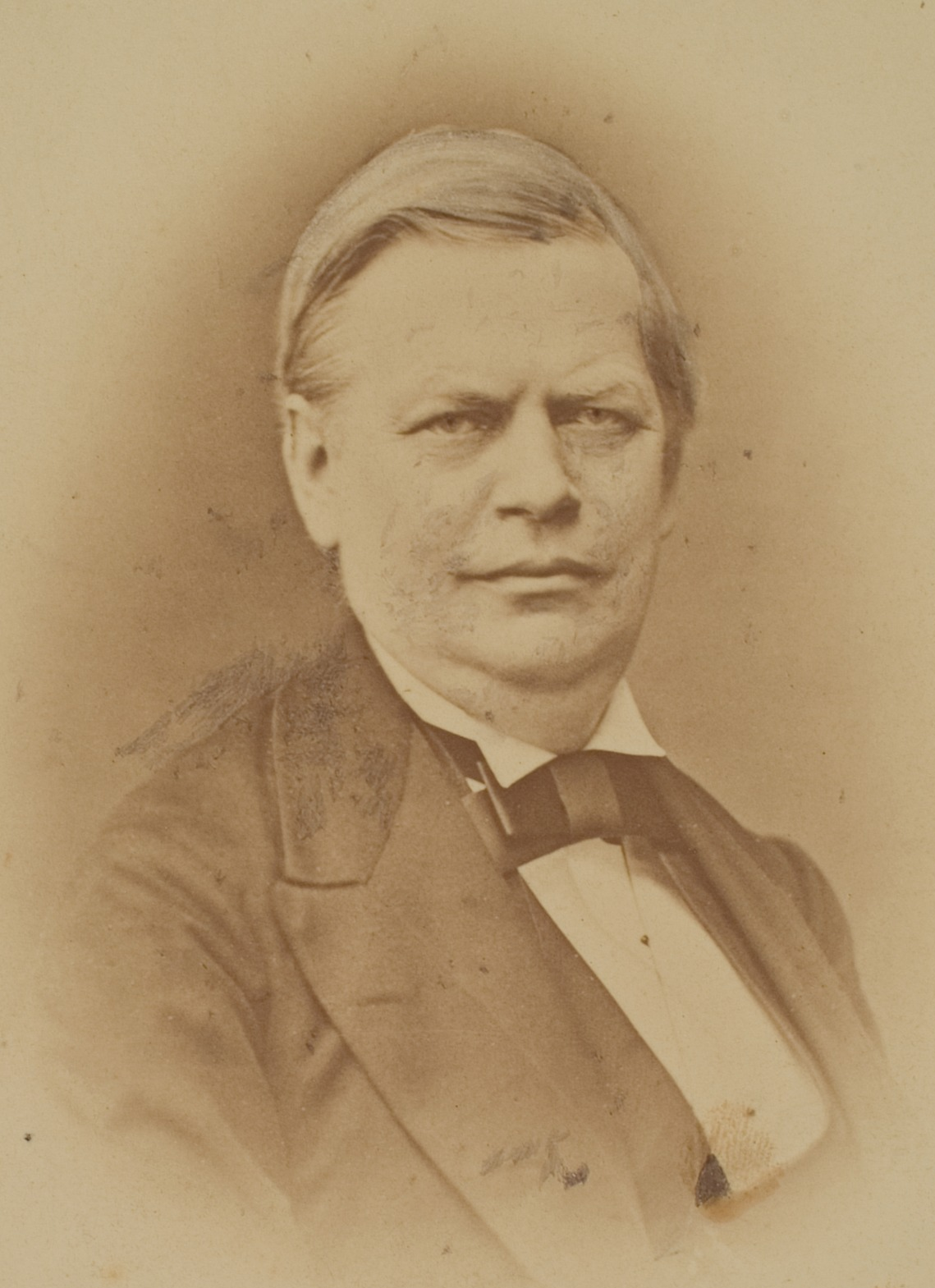 Karl Bernhard Stark, Archäologe, 1855–1879 Professor in Heidelberg